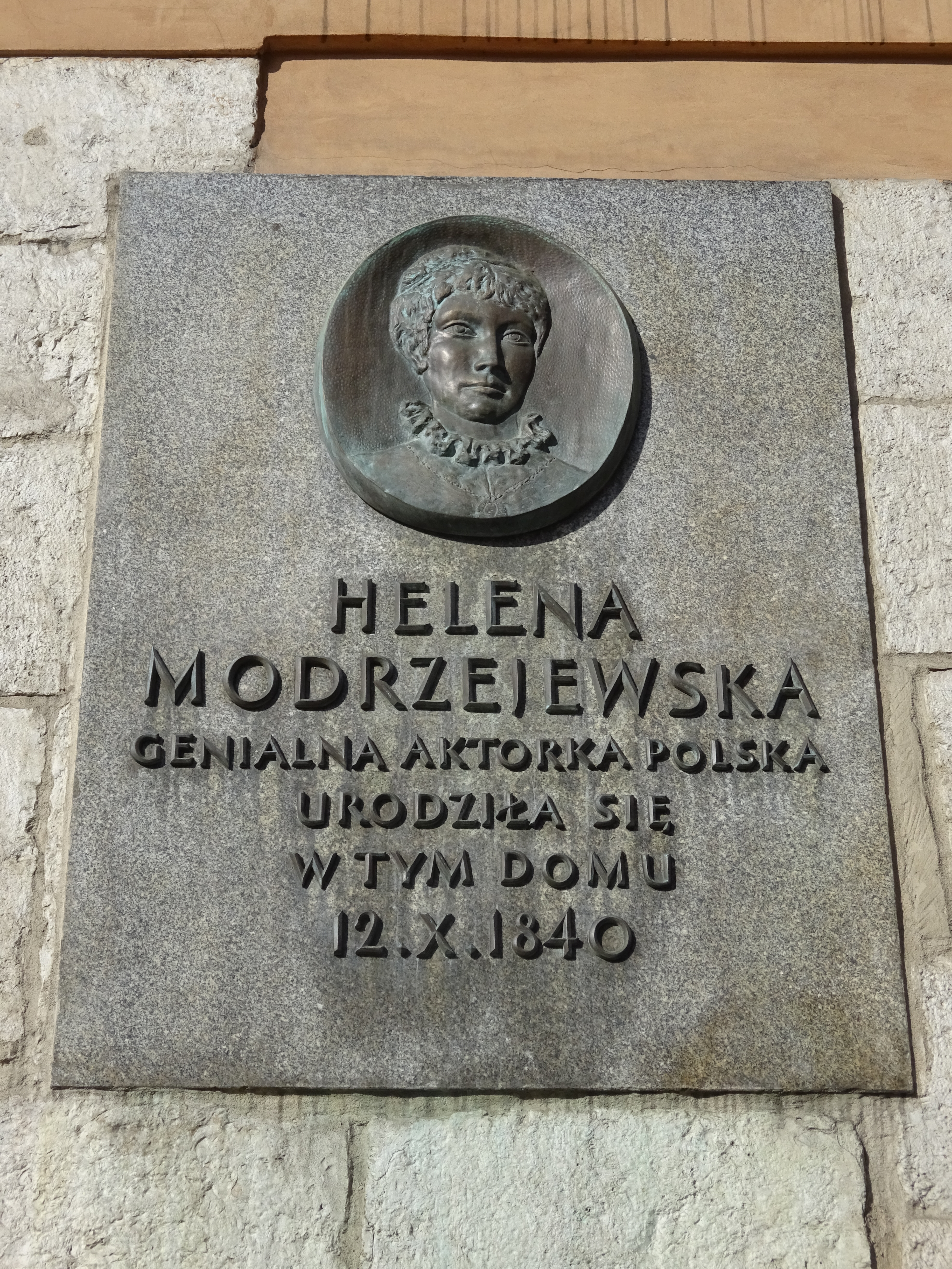 Ulica Grodzka 22 - tablica upamiętniająca przyjście na świat w owej kamienicy Heleny Modrzejewskiej w 1840 roku. Kraków, 2017.